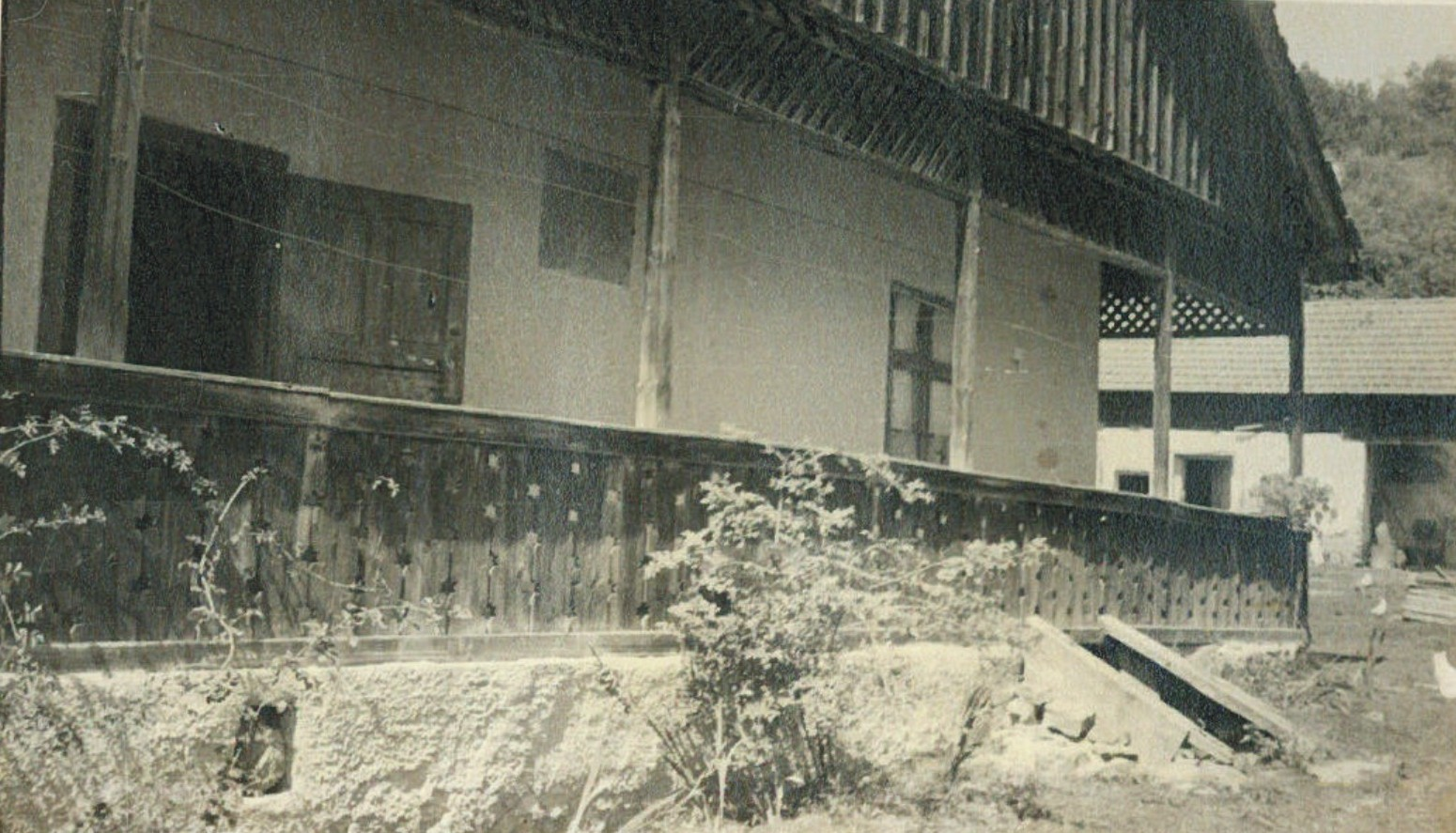 Casa in care s-a nascut E. Hodos. Pe unul din pereti este inscris: "S-a ridicatu aceste case parochiale prin stăruinta si interventia parochului si protopopului Simeon cav. de Balint. Ne sin posteritas ingrata"